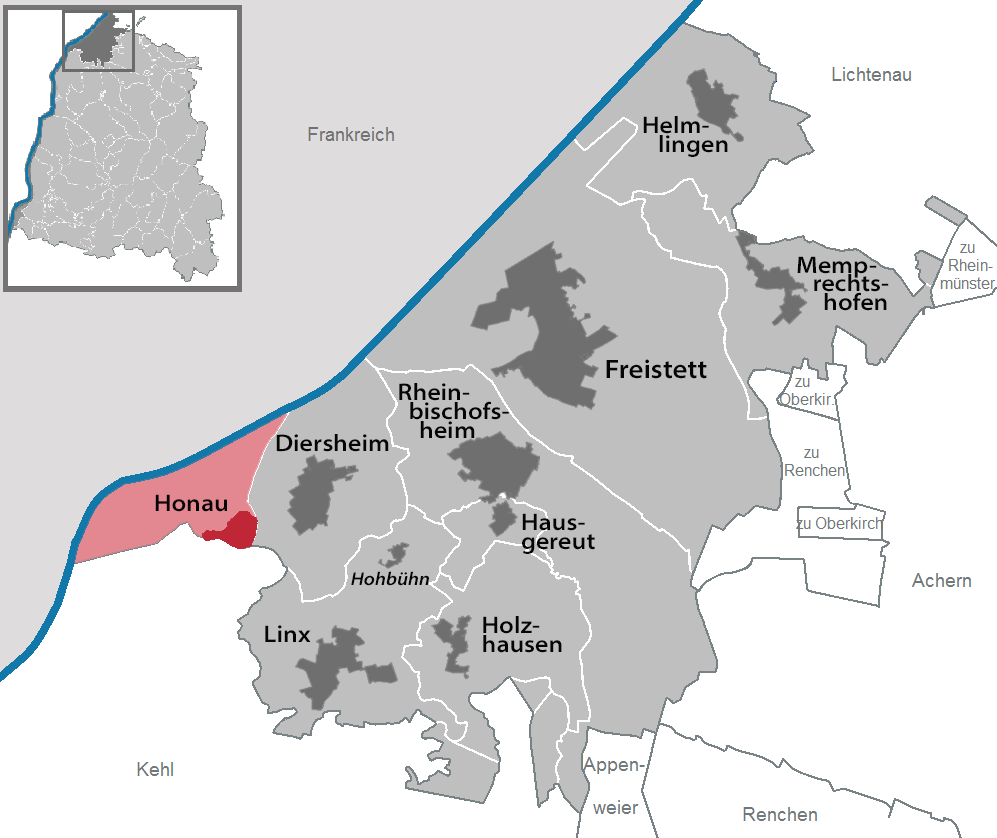 Lage von Honau in Rheinau